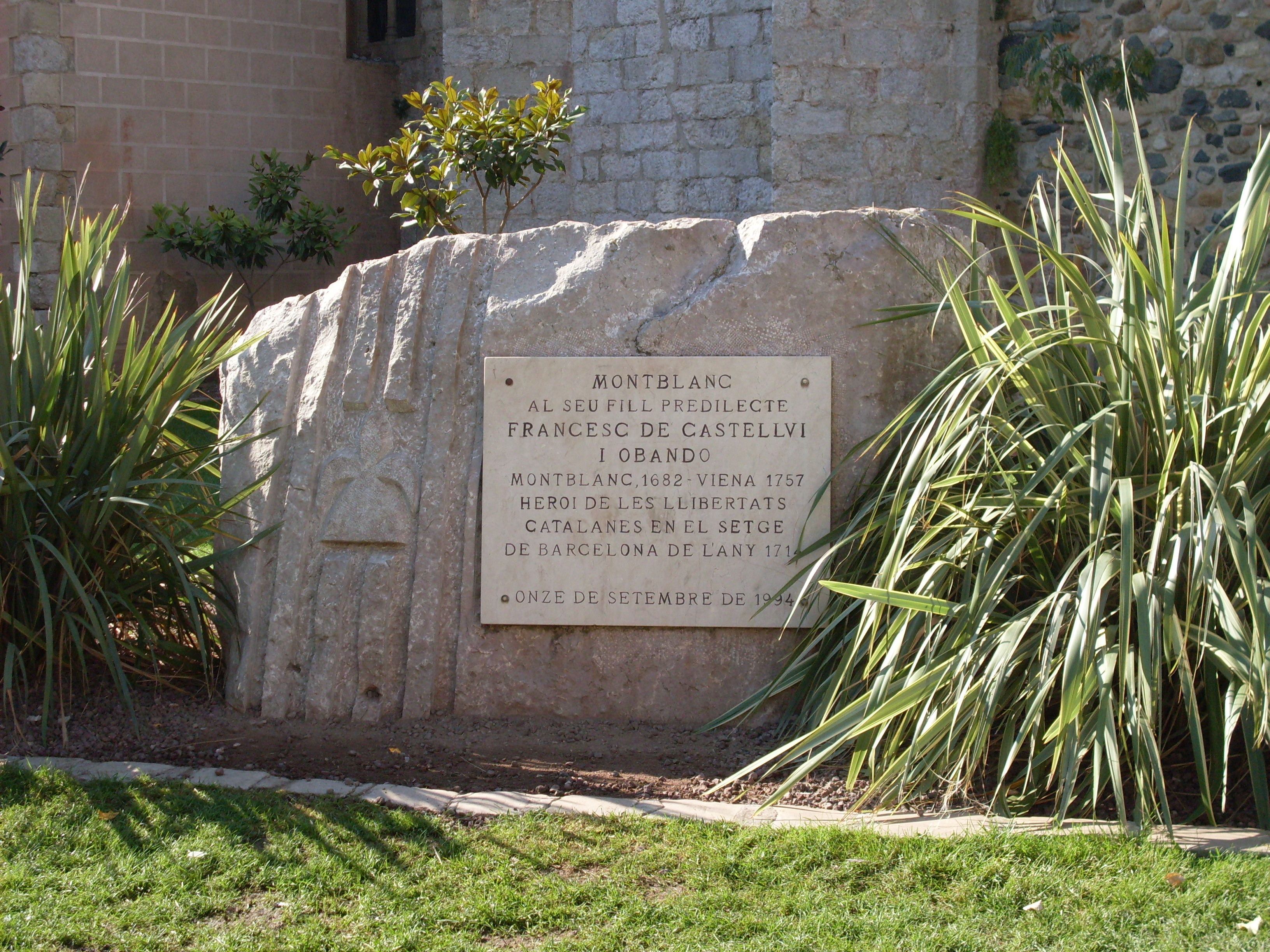 Monument a Francesc de Castellví i Obando, fill de Montblanc i heroi del setge de Barcelona durant la Guerra de Successió Espanyola. Es troba a la Plaça de Sant Francesc, a Montblanc, Conca de Barberà, Tarragona.